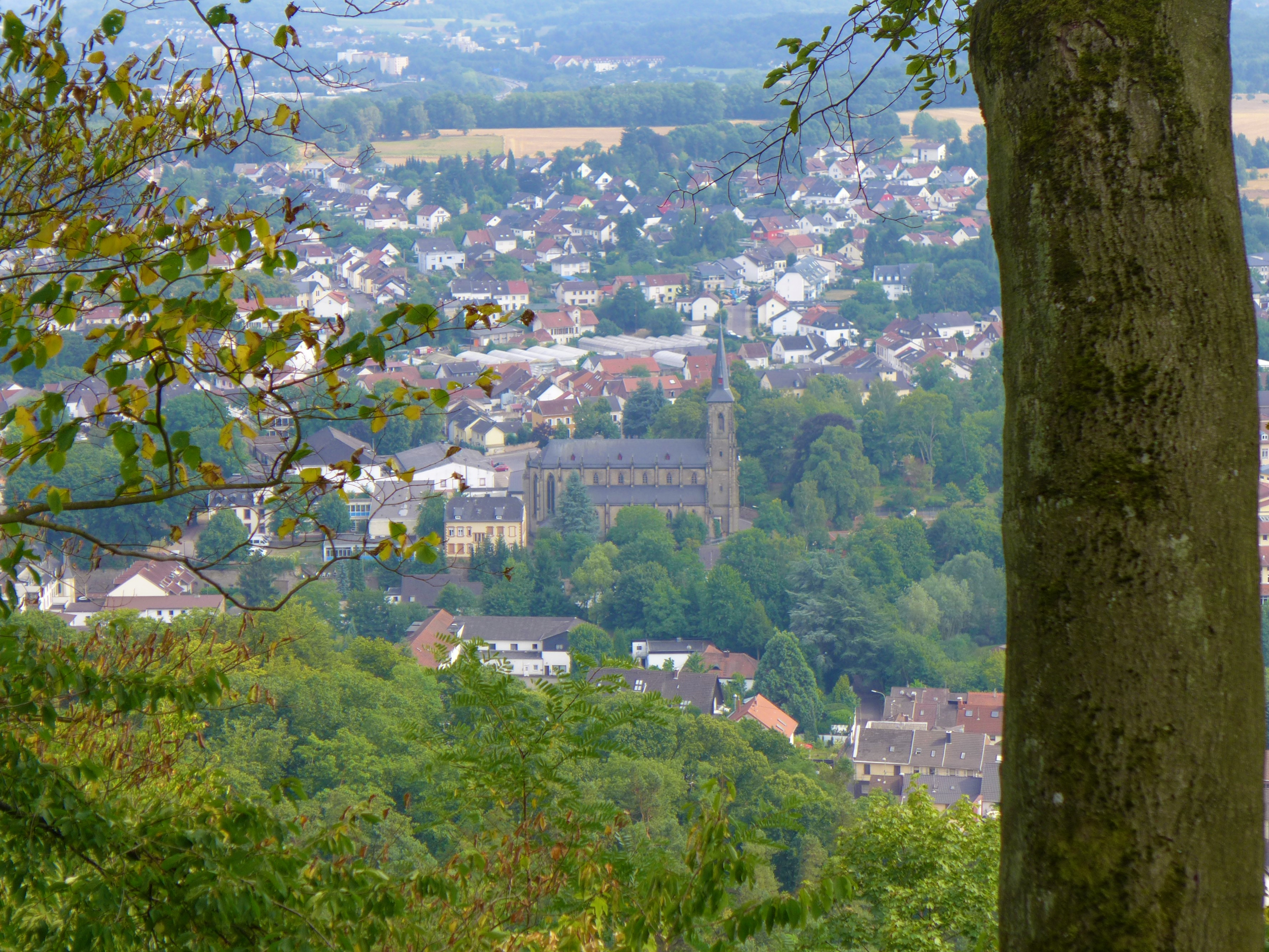 Wallerfangen, Ansicht vom Limberg